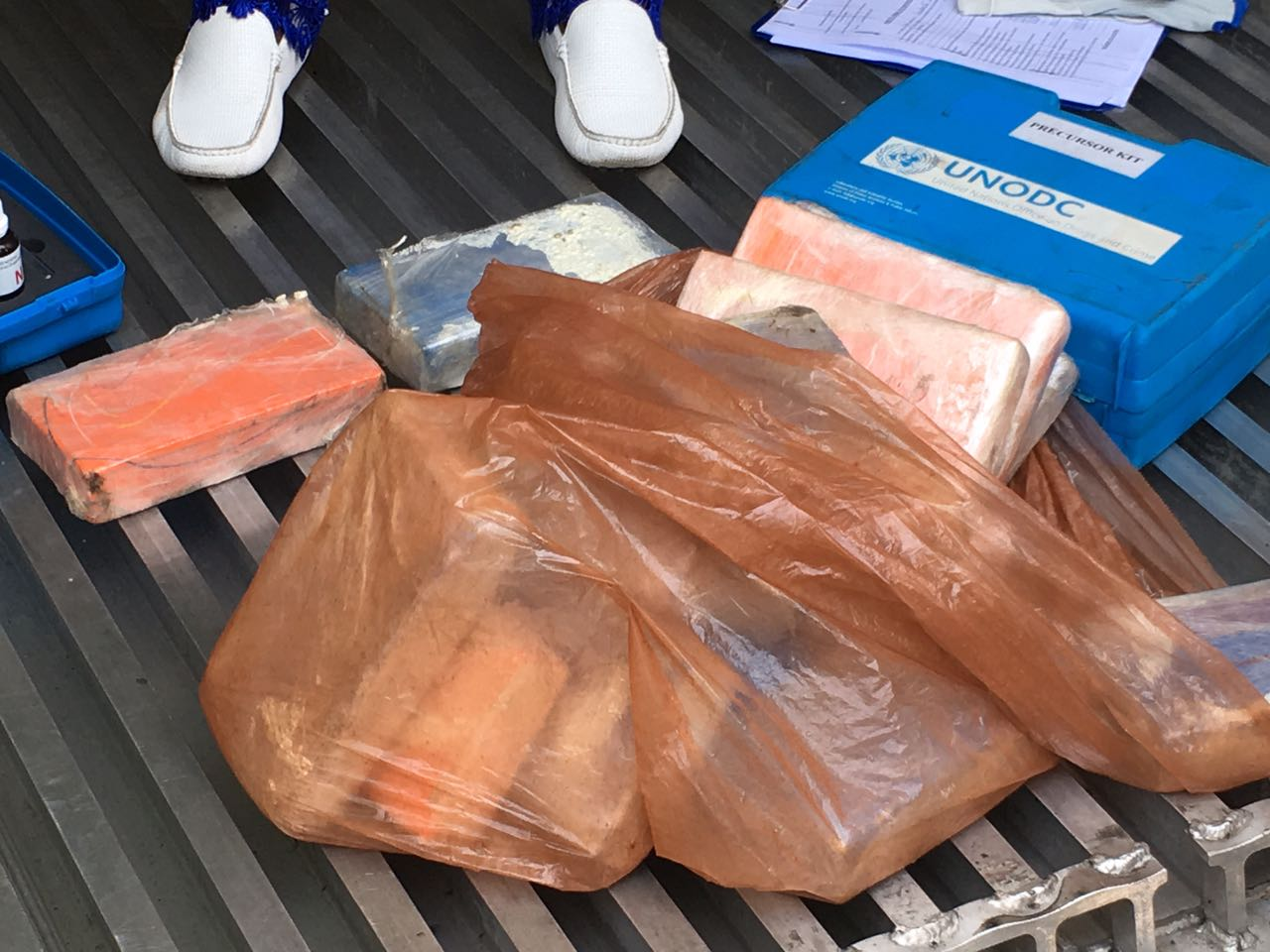 Les 18 kg de drogue découverts dans le container, à Cotonou, Bénin, le 30 octobre 2016. La découverte dans l'un des conteneurs de la société CAJAF COMON, chargée de la distribution des produits agroalimentaires, et appartenant à l'homme d'affaires Sébastien Ajavon une quantité de cocaïne évaluée à 18kg. La quantité de drogue trouvée serait estimée à près de 9 milliards de FCFA. (VOA/Ginette Fleure Adande)